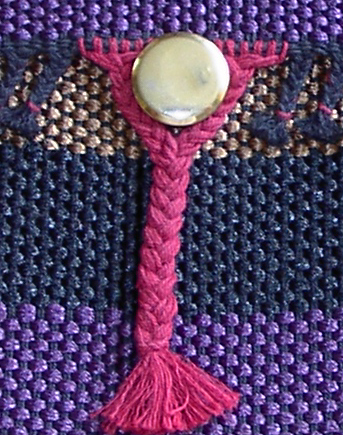 Fläta, sammanflätad med två flätor.